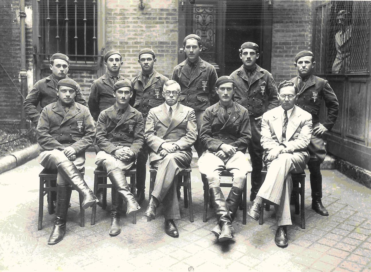 ביקור קבוצת האופנוענים של בית"ר ארץ-ישראל בשלטון בית"ר פאריז. יושבים (מימין לשמאל): בנימין לובוצקי, יהושע שמרלינג, זאב ז'בוטינסקי, בנימין כהנא, משה אריאלי. עומדים מימין לשמאל: אריה טגנסקי, גבריאל בקשי, מאיר לוין, יעקב ורדינא, קרבצקי, זאב כצנלסון . התמונה נמצאת גם בארכיון מכון ז'בוטינסקי בישראל